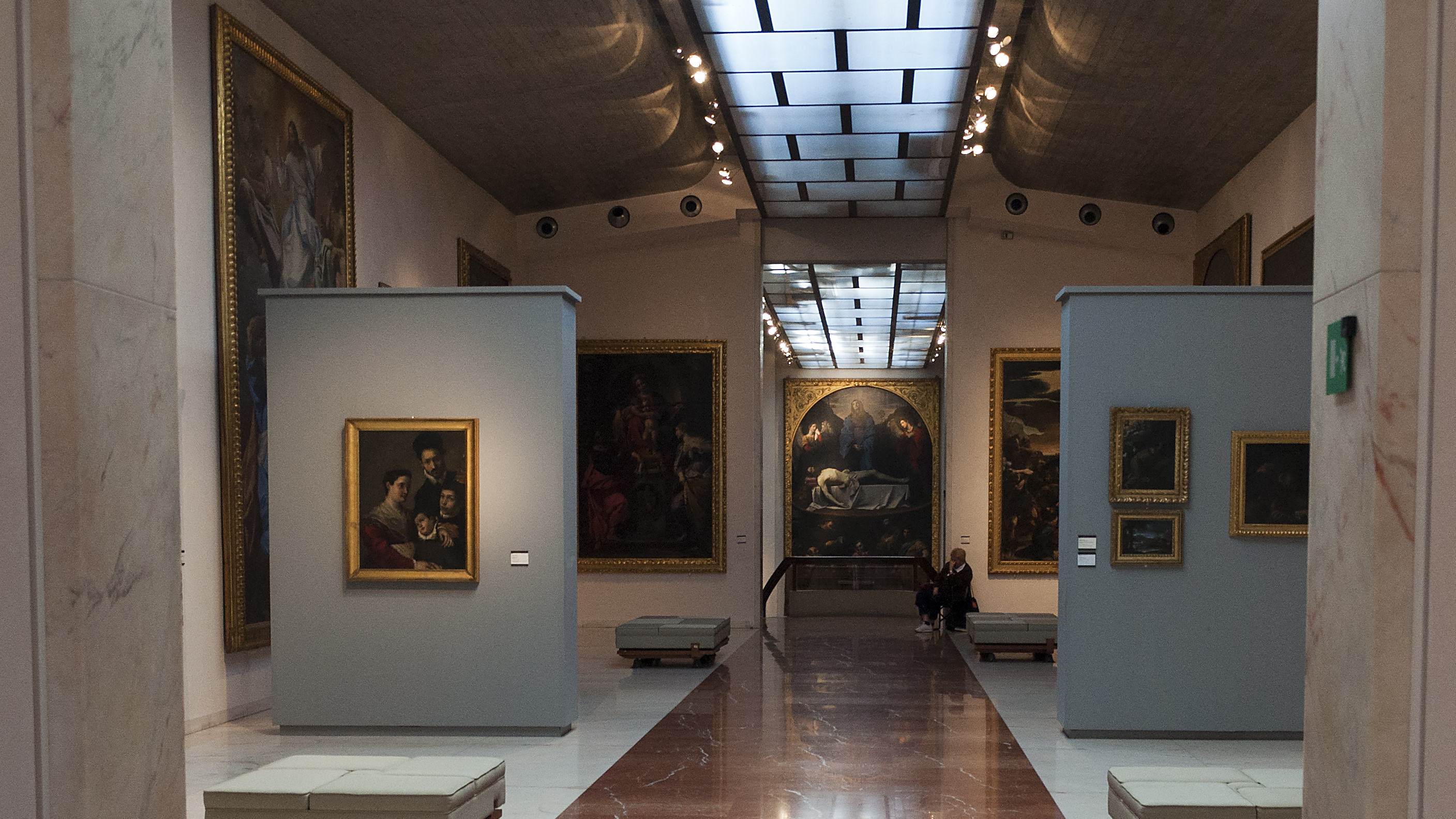 Een van de zalen van de Pinacoteca Nazionale di Bologna